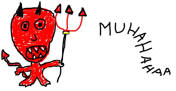 Piru